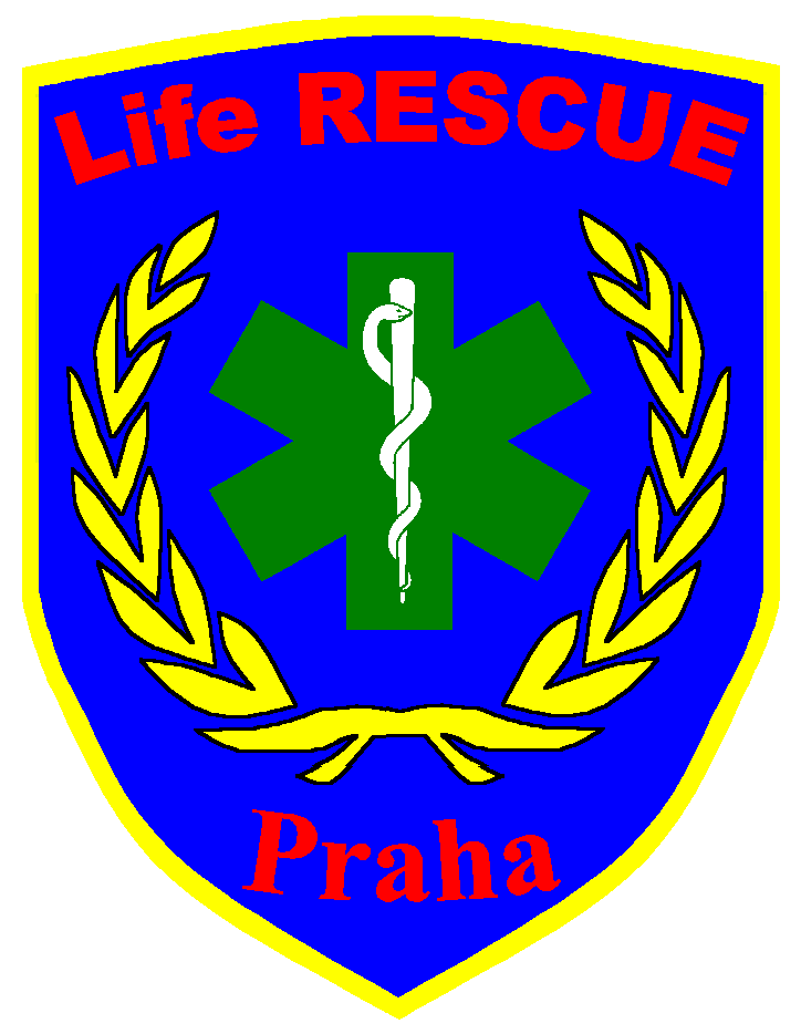 Logo spolku Life RESCUE